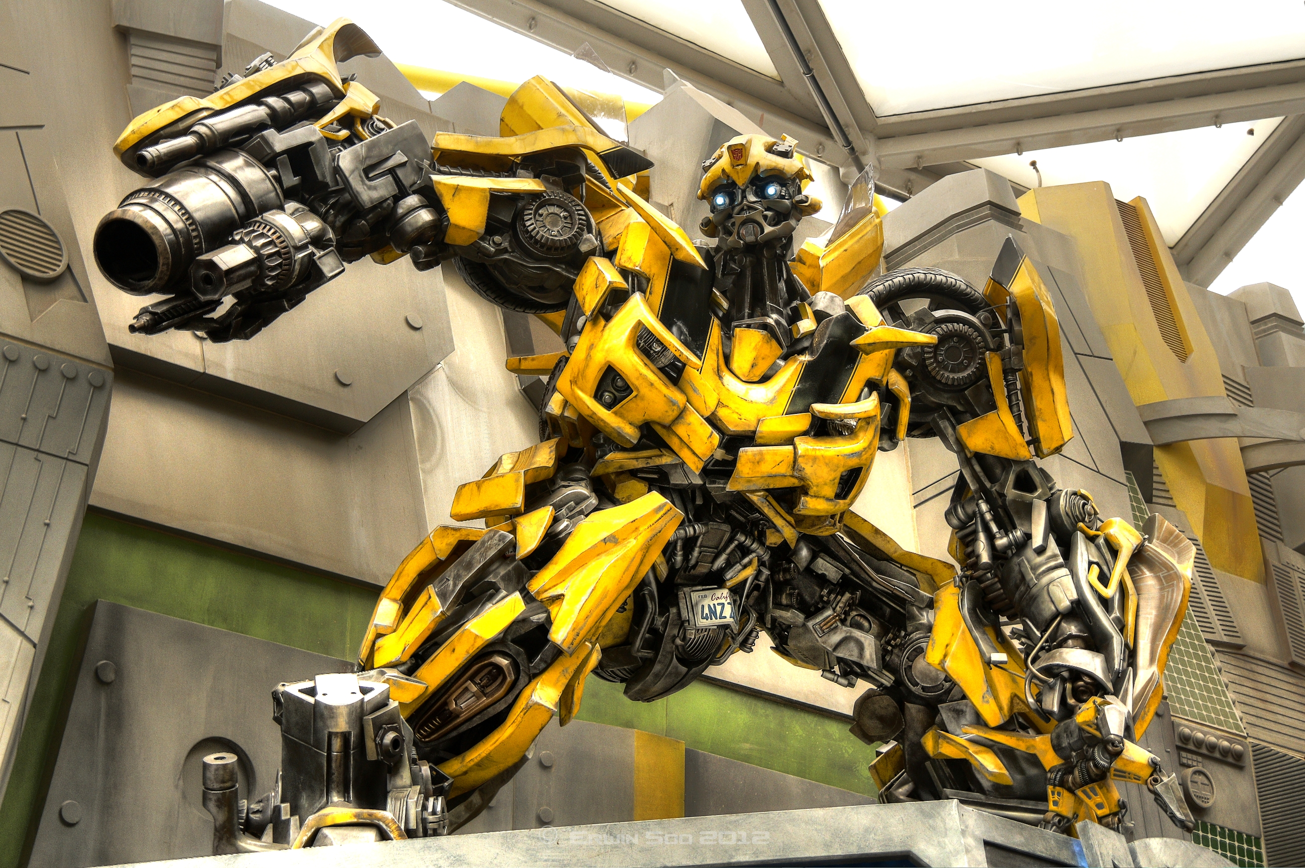 bumblebee